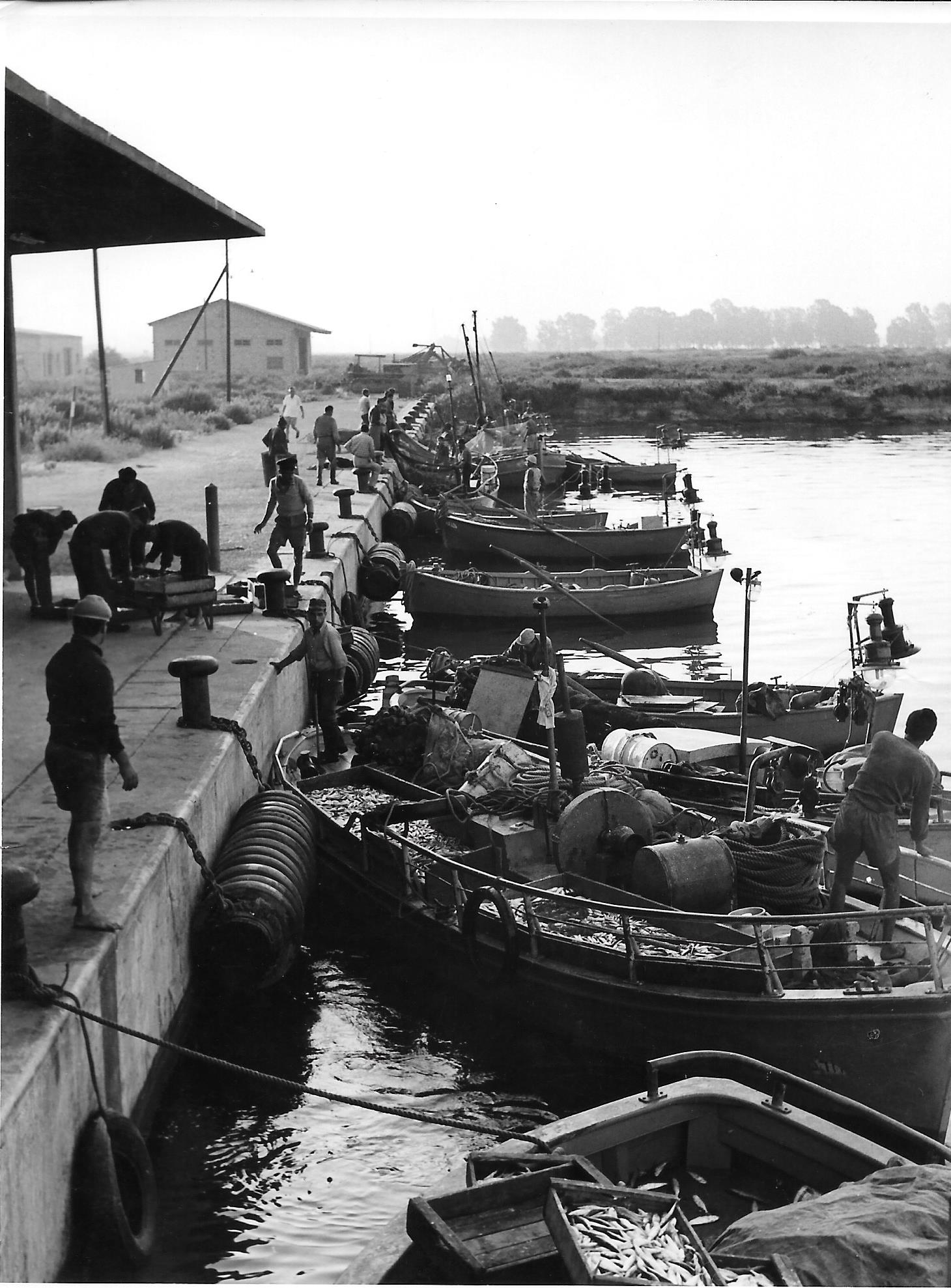 סירות דיג באורות ברציף הדיג לאחר בנייתו, 1958